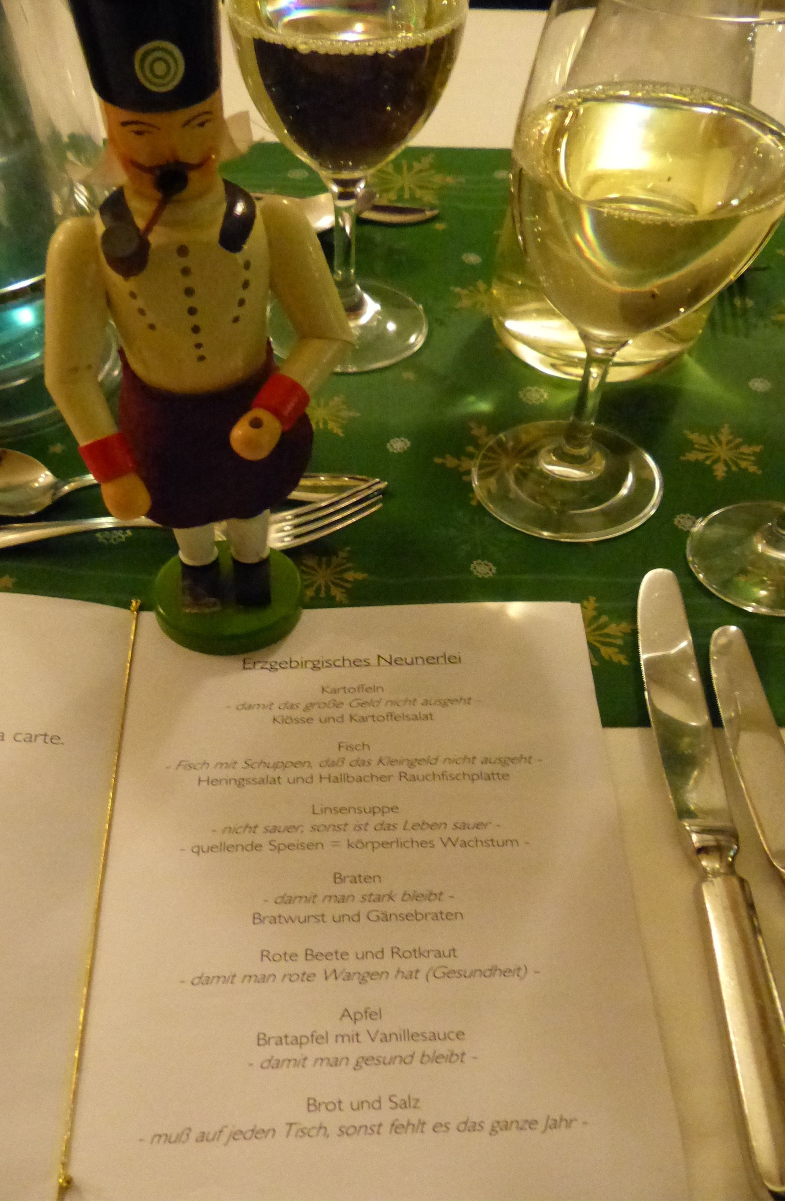 Neunerlei-Karte zu Weihnachten aus Olbernhau (Saigerhütte)